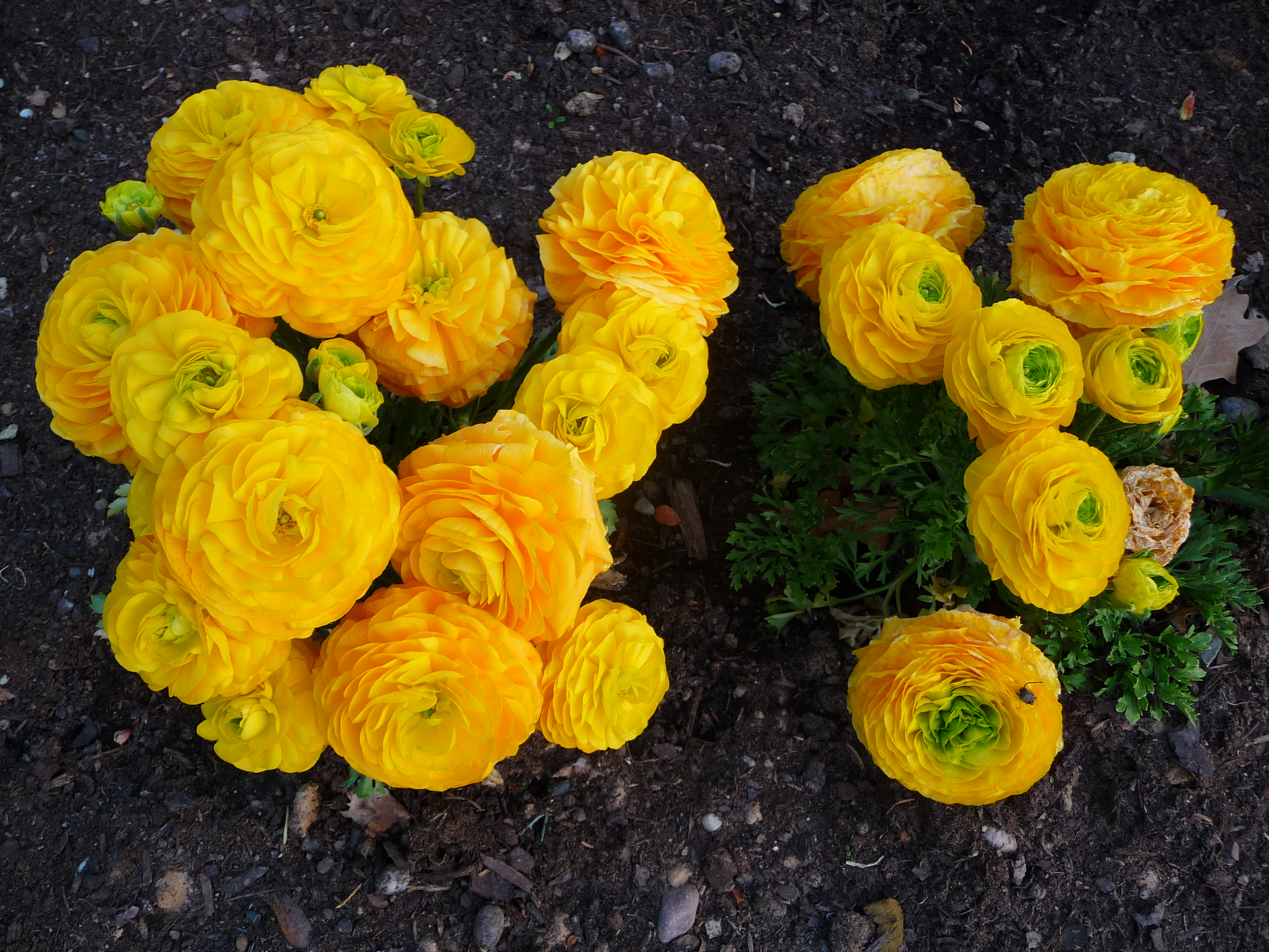 Gelbe Ranunkeln (Ranunculus asiaticus)